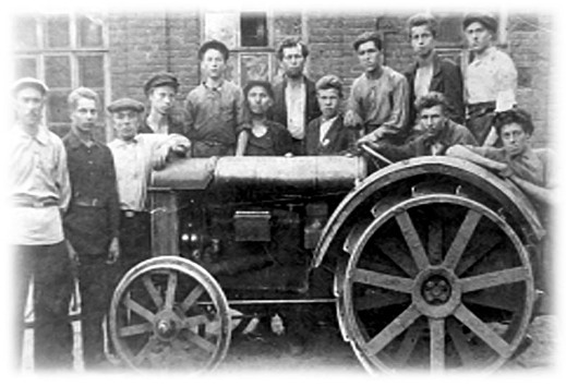 Федоров Михаил Федорович (1911-1960) в верхнем ряду, третий справа. Во время обучения в ставропольском профтехучилище